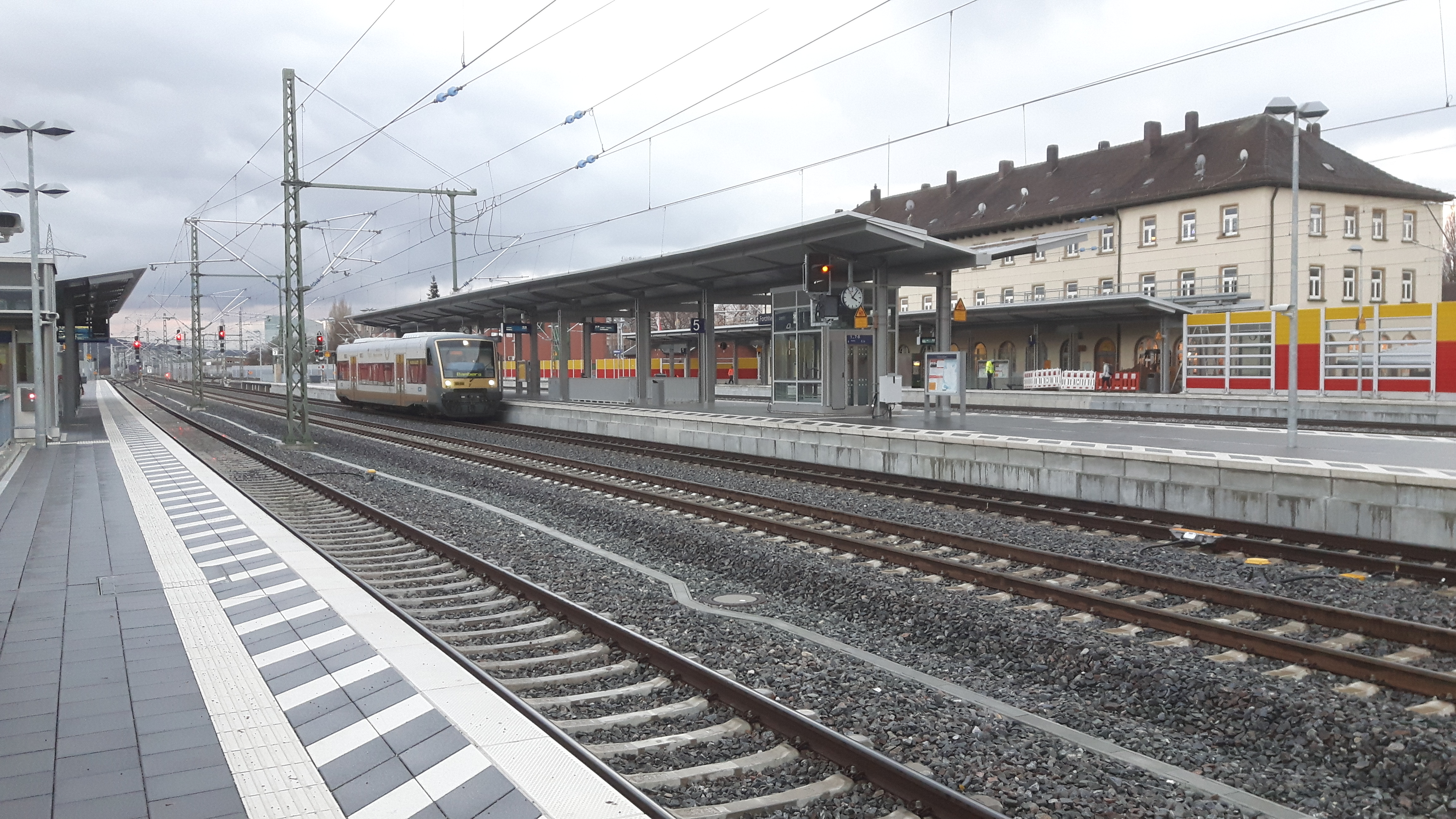 Bahnhof Forchheim von Norden nach Abschluss des Umbaus im Dezember 2018